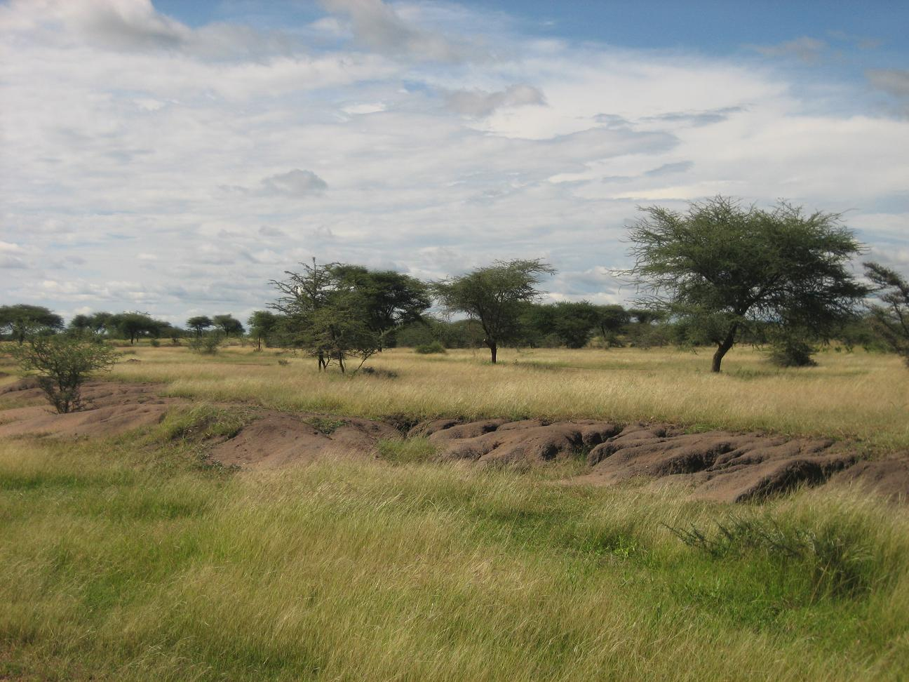 Ipililo